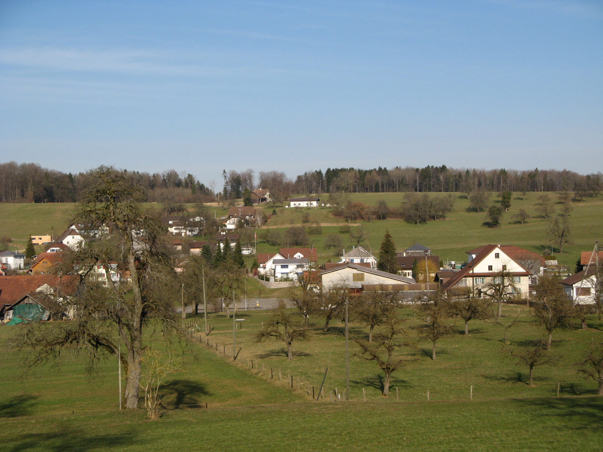 Ansicht von Uezwil